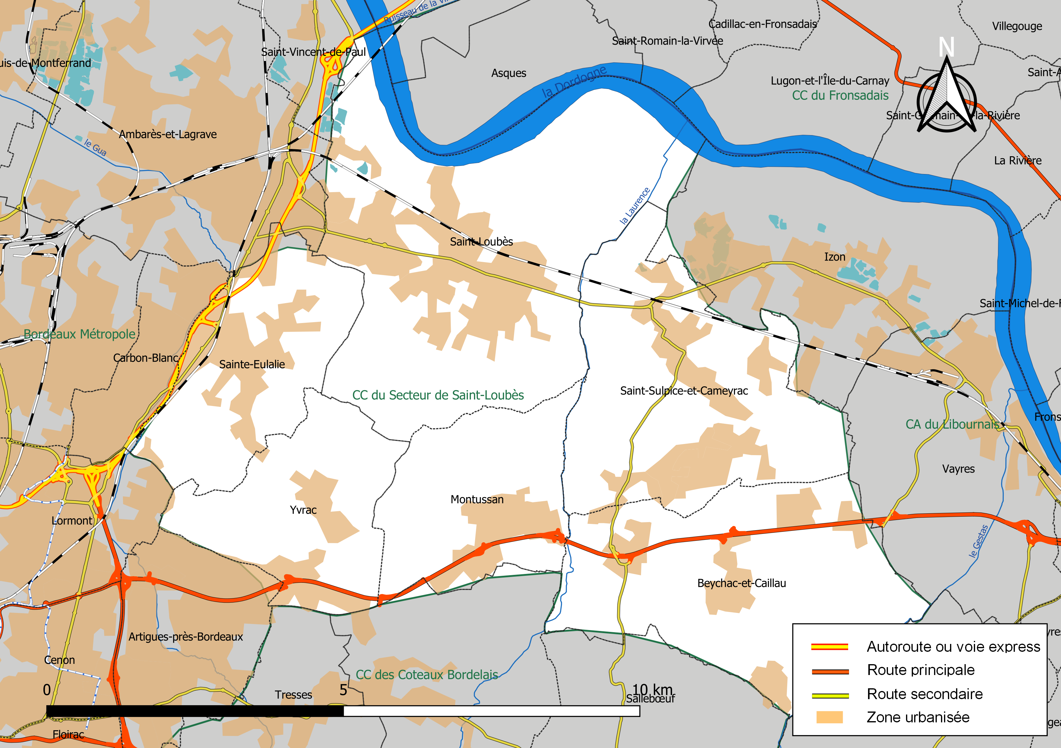 Carte géographique de la Communauté de communes du Secteur de Saint-Loubès, département de la Gironde, France. Composition au 1er janvier 2019.